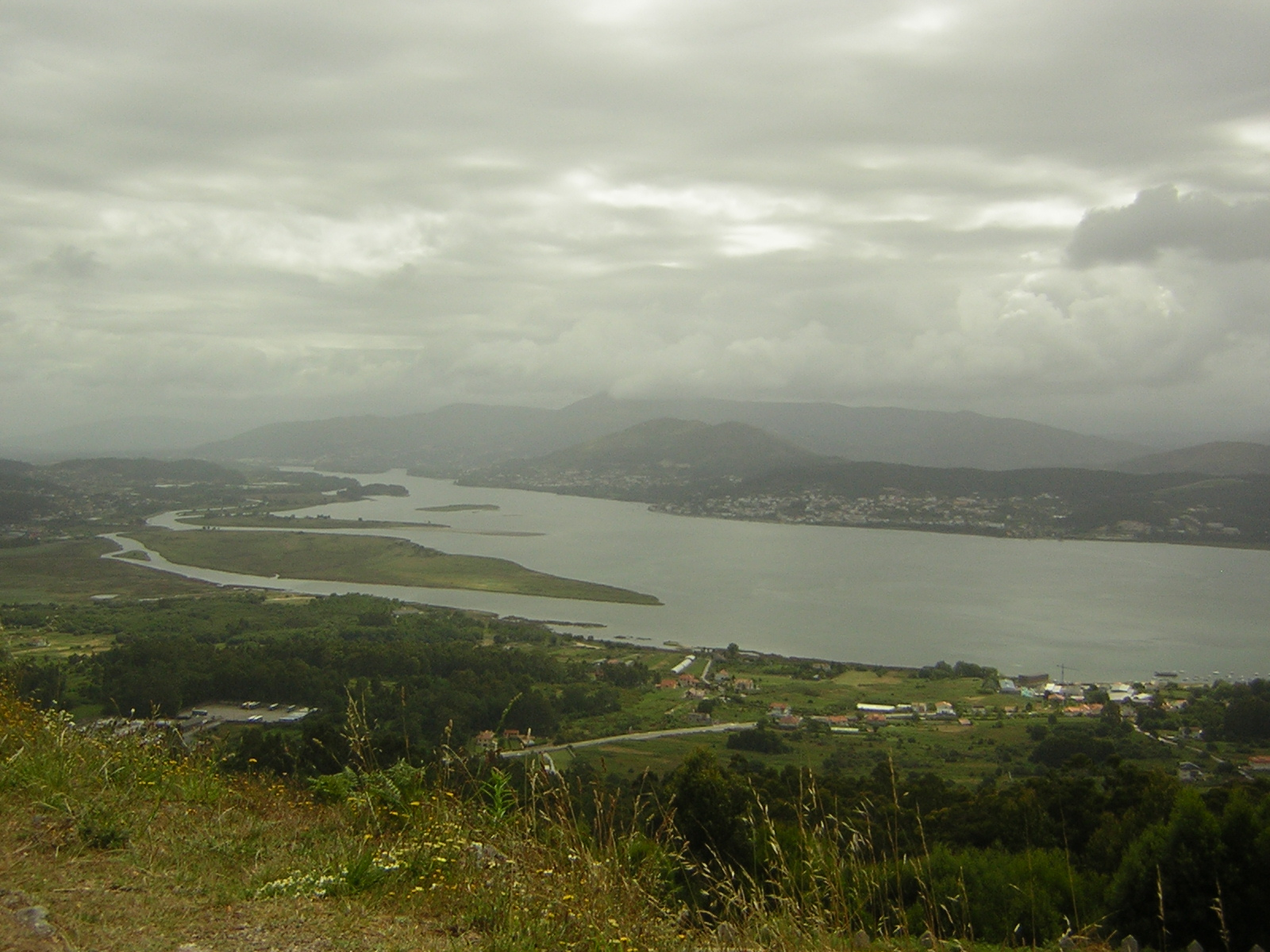 Río Miño visto desde el monte de Santa Tecla. La Guardia, Pontevedra (España).